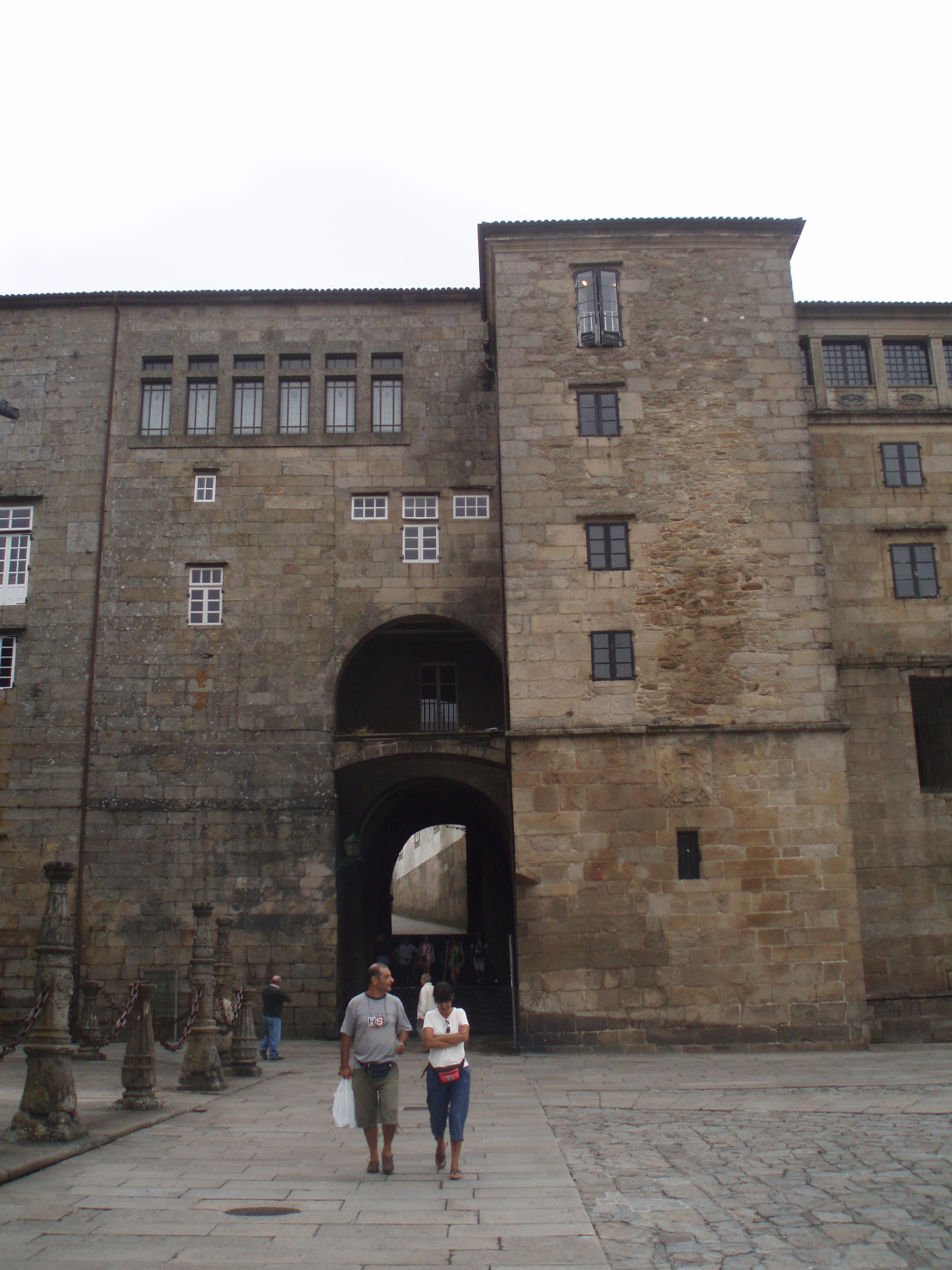 Arco del Palacio arzobispal de Santiago de Compostela, antiguo Palacio de Gelmírez.